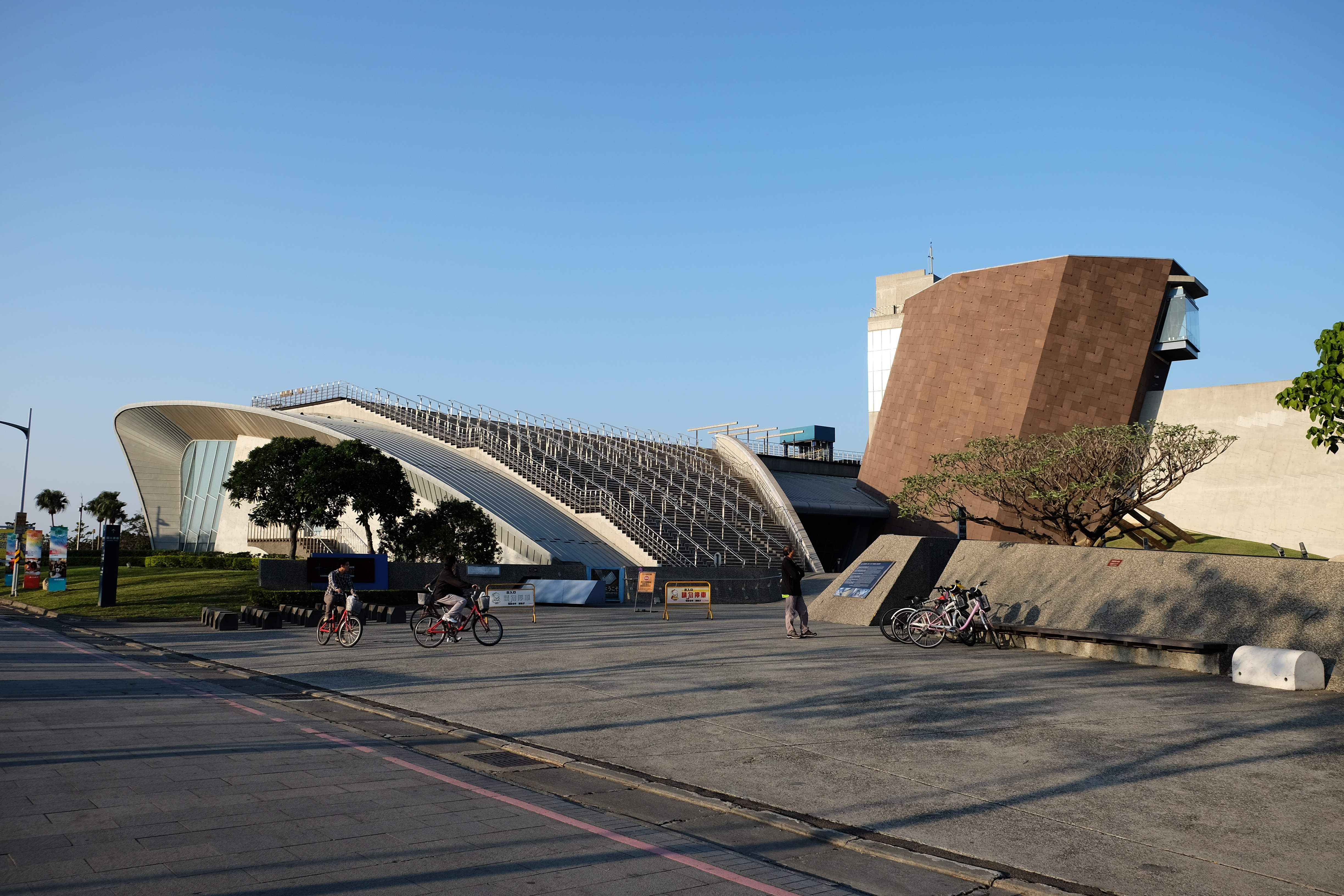 中文（台灣）: 新北市立十三行博物館